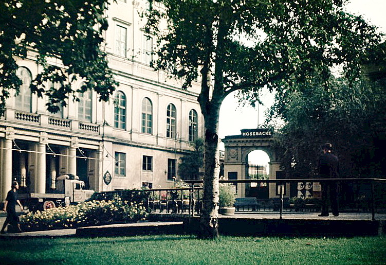 Södra teatern. Mosebacke torg, Södermalm. "Mosebacke teater, Stockholm Motiv: Stockholms innerstad Nyckelord: Riksintressen Kategori: Stadsmiljö, Teater Södra teatern. Mosebacke torg, Södermalm. "Mosebacke teater, Stockholm.